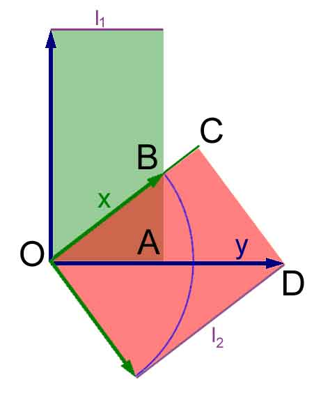 Dernière de la série produit scalaire. La figure illustre la symétrie de l'application bilinéaire.